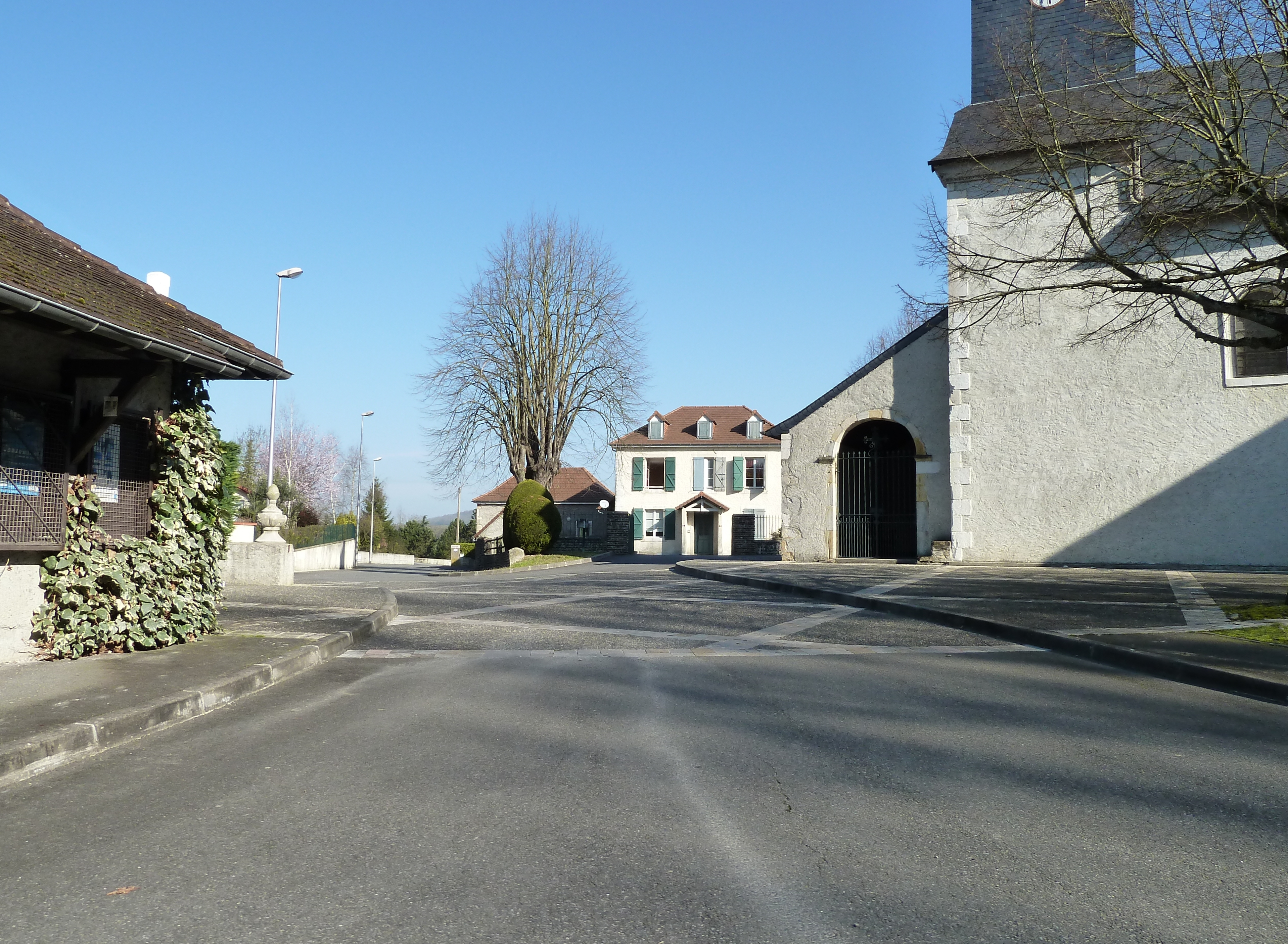 Centre de Mont (Pyrénées-Atlantiques)